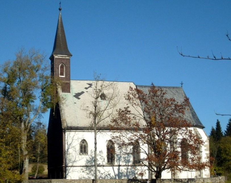 Česky: Kostel Božího Těla ve Svatém Tomáši.